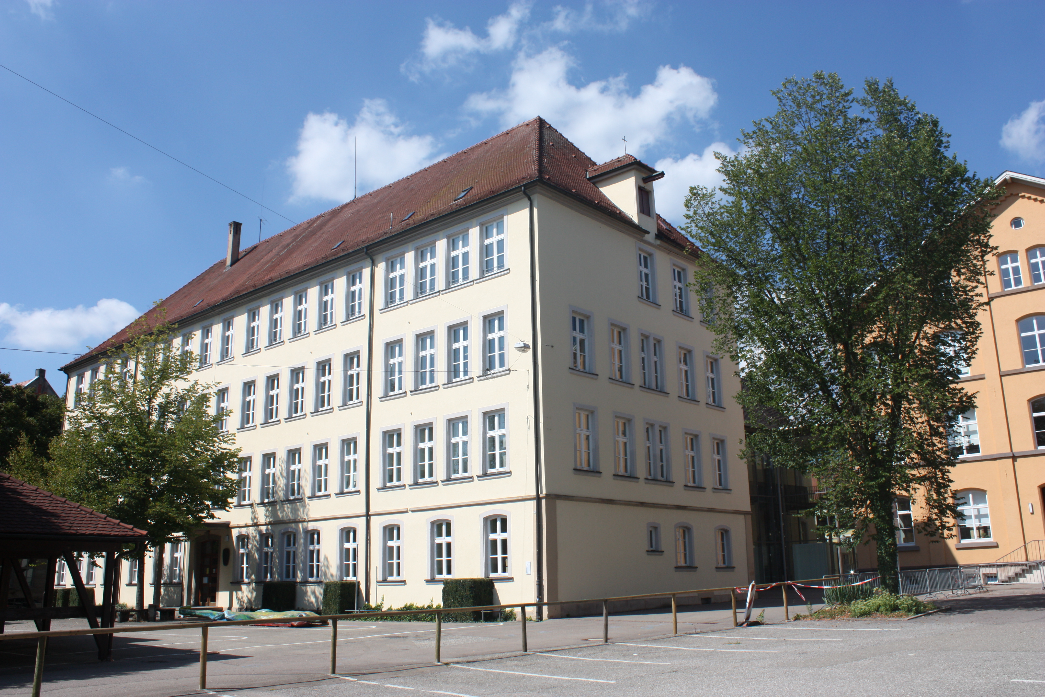 Klösterle (Schwäbisch Gmünd) von Süd-Osten